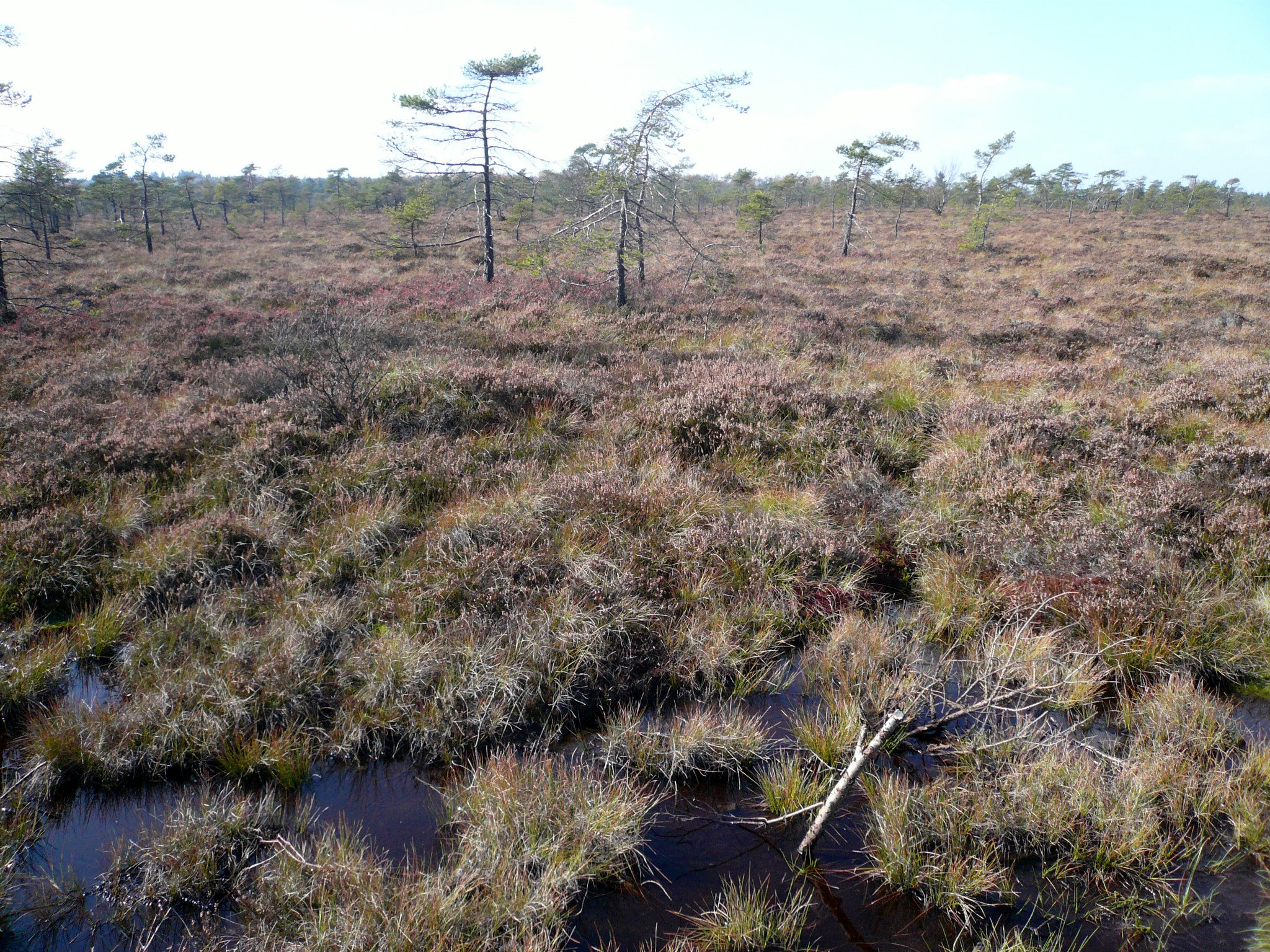 Schwarzes Moor